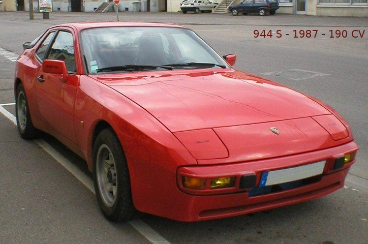 Description : Porsche 944S - 1987 - 190 CV Auteur : Eric D